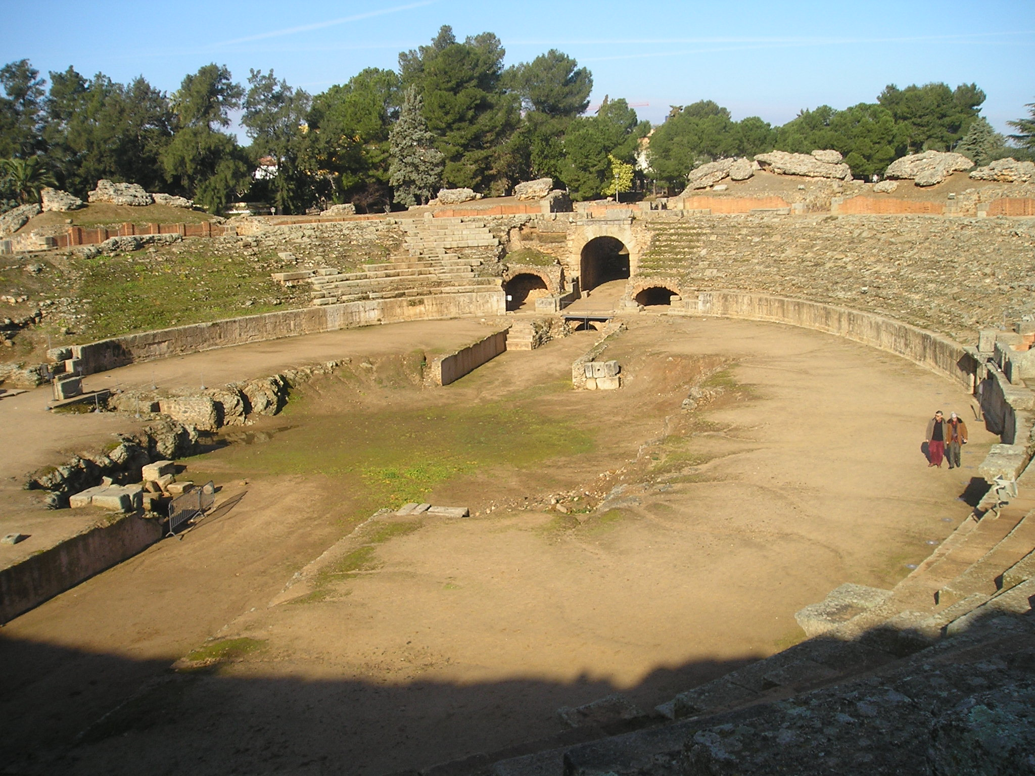 Arena del Anfiteatro romano de Mérida, la antigua Colonia Emerita Augusta